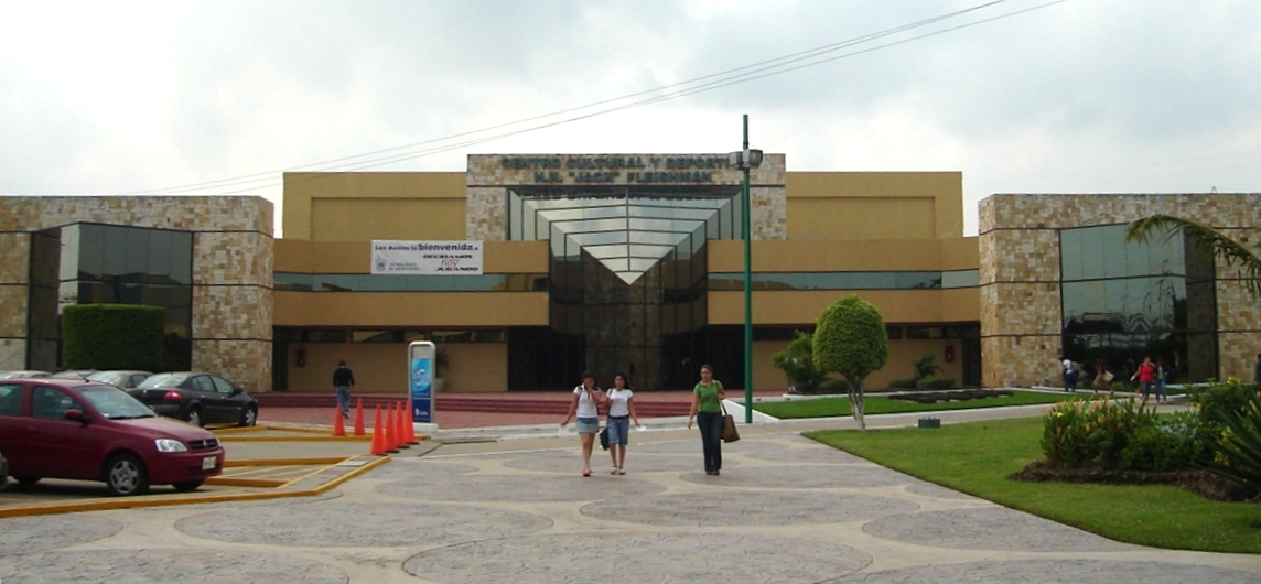 CENTRO CULTURAL Y DEPORTIVO "JACK FLEISHMAN"